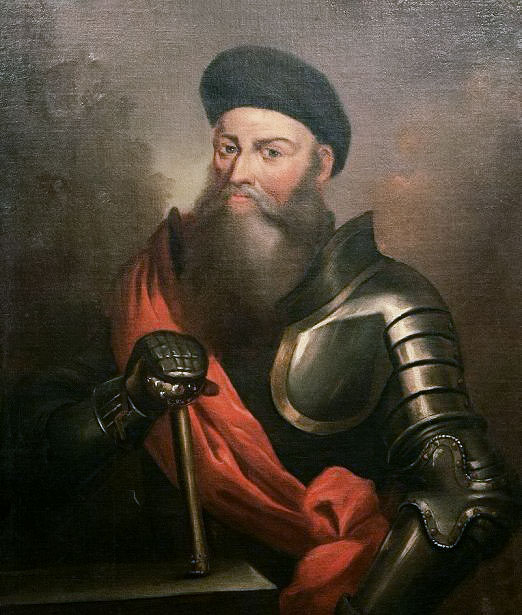 Беларуская (тарашкевіца): Партрэт Канстантына Астроскага (Канстантына Васіля Астроскага)